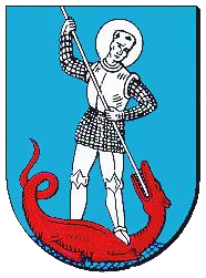 Wappen von Dalheim (Rheinhessen)